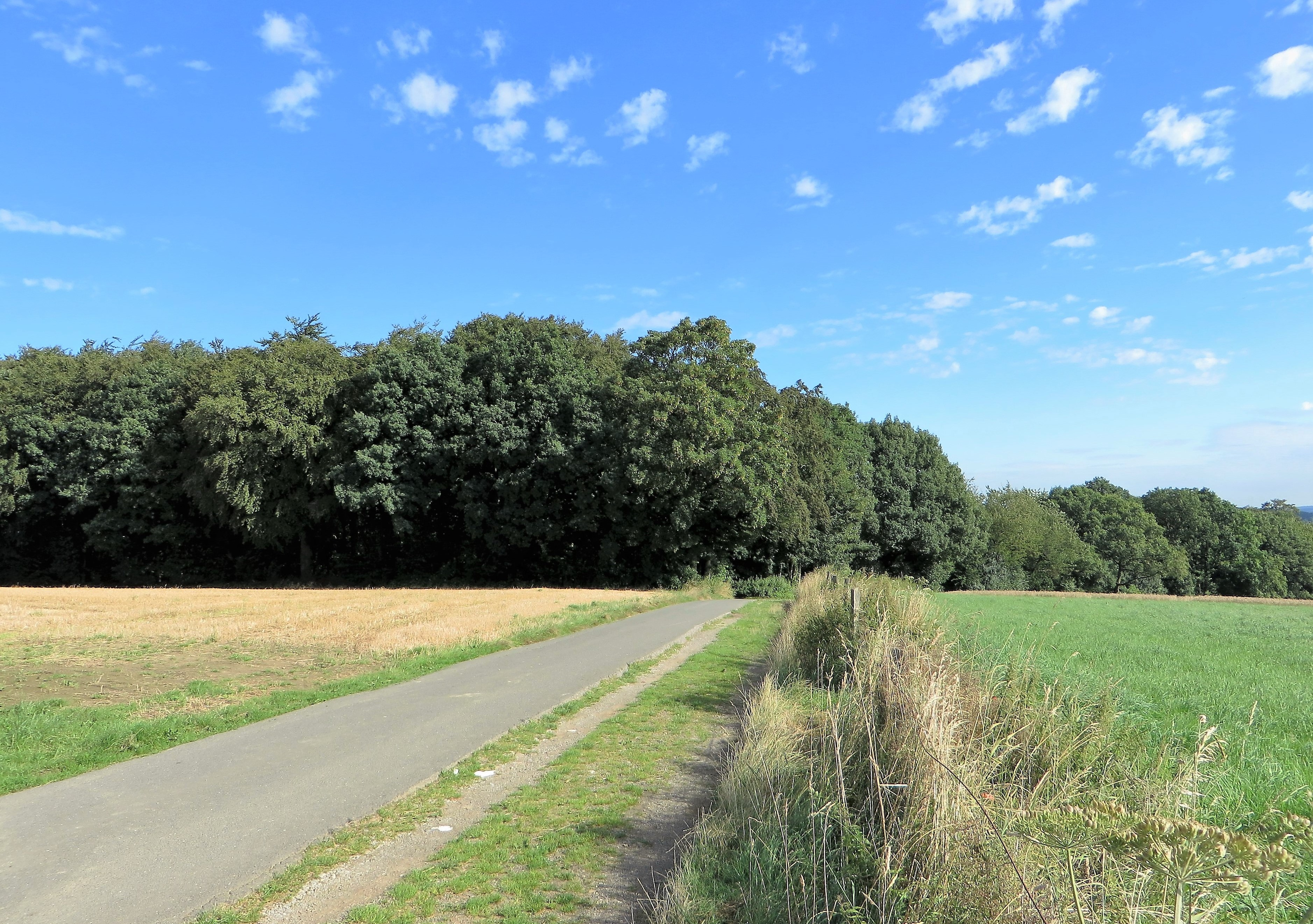 Landschaftsschutzgebiet „Schee“ in Sprockhövel-Gennebreck. Das Foto zeigt den südlichen Bereich in der Nähe der Straße „Mollenkotten“ (L 432) mit dem Wald- und Wandergebiet Hilgenpütt.